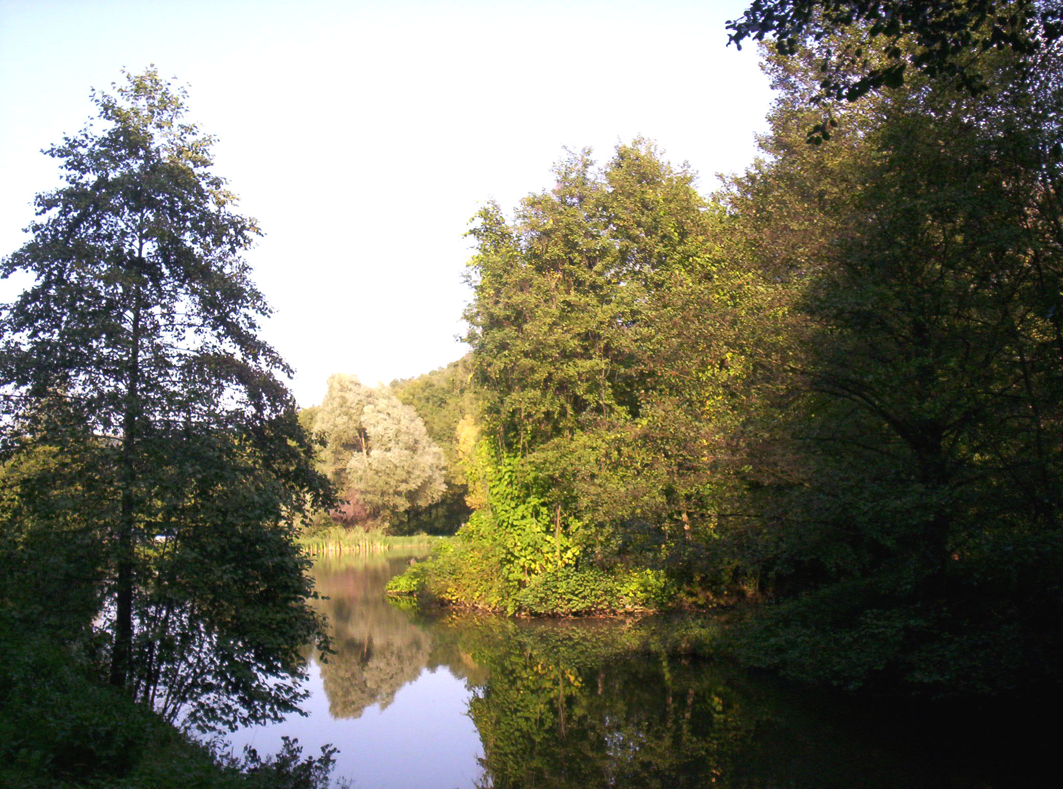 A három váraljai horgásztó egyike – photo taken by uploader User:Csanády in 2006.